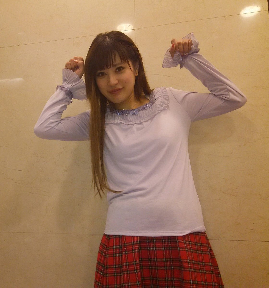 正面